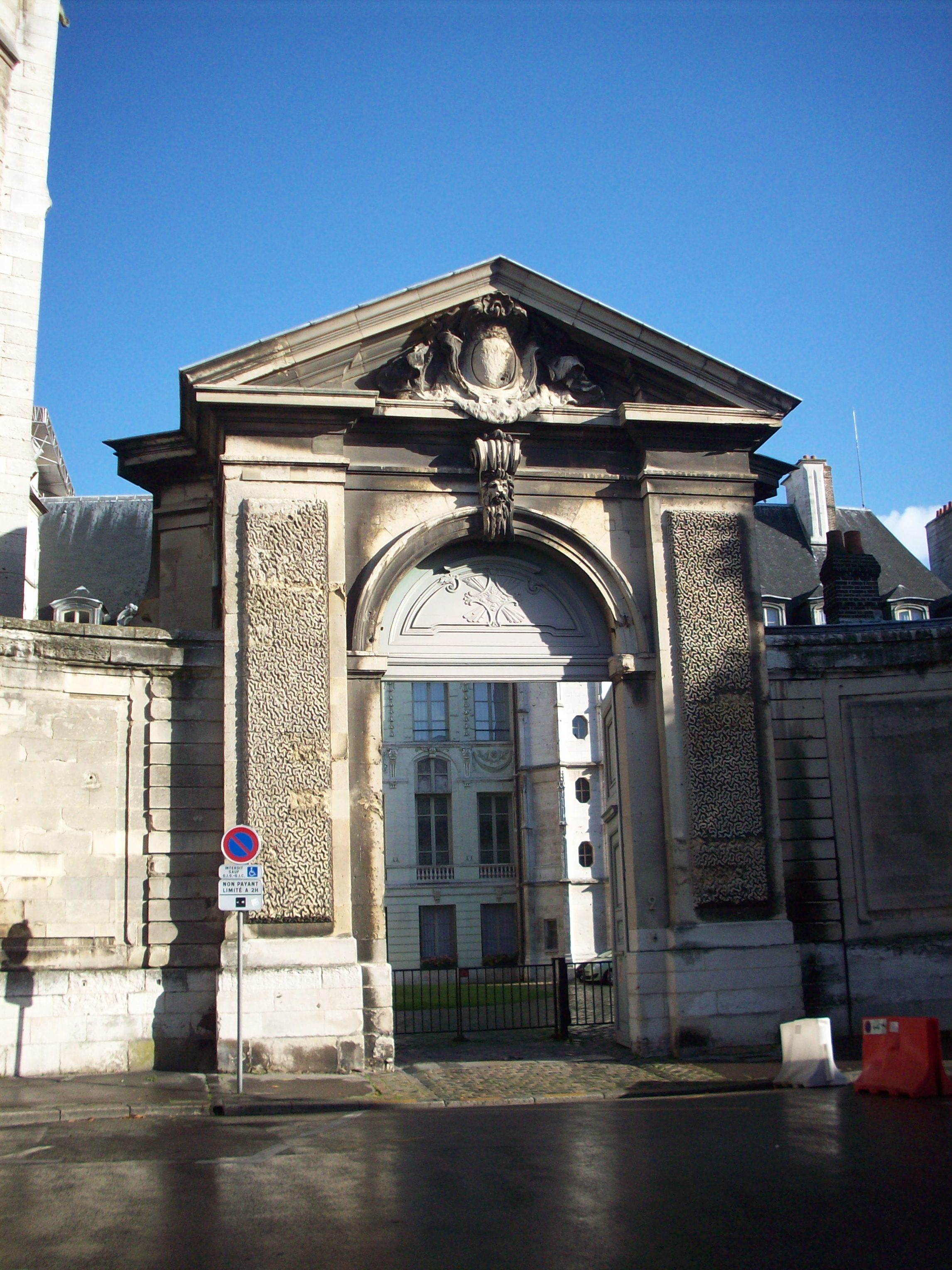 Portail d'entrée de l'archevêché de Rouen, derrière la cathédrale.